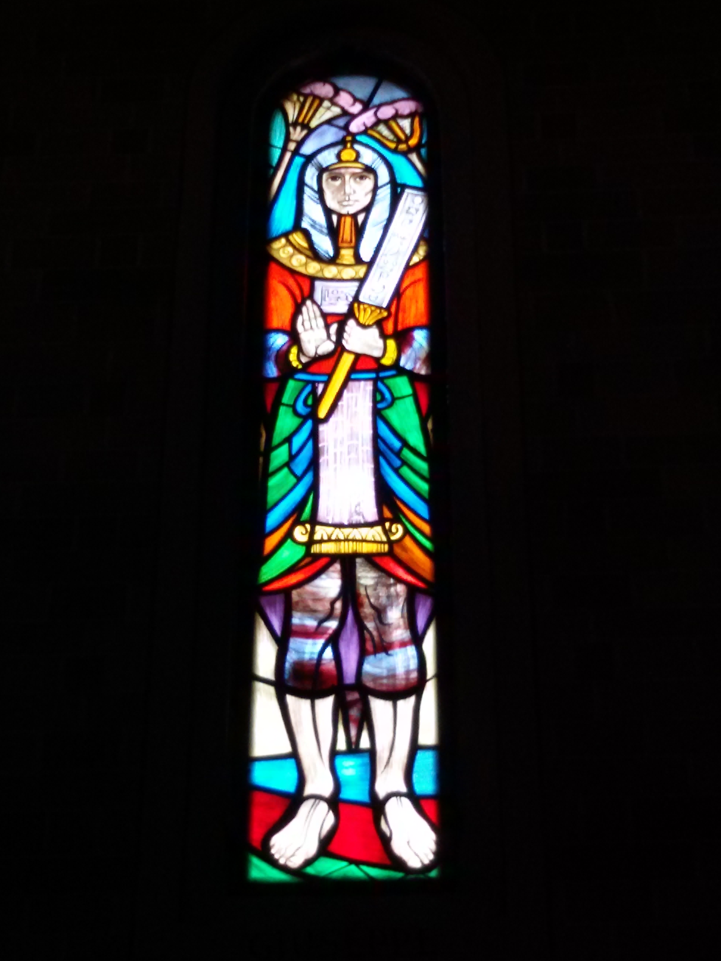 vetrata